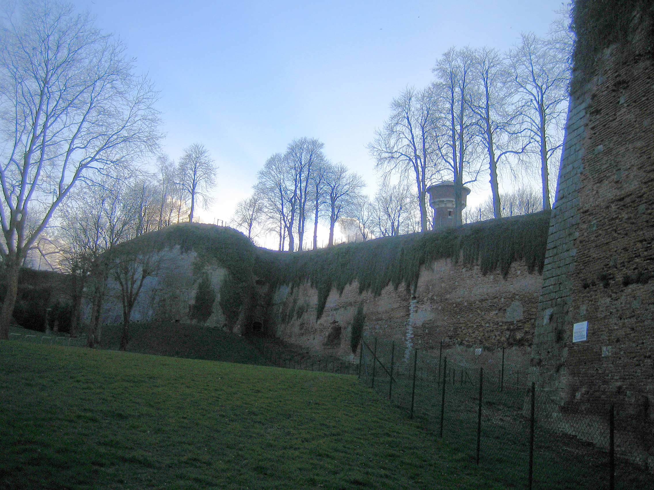 Doullens (Somme), France - La Citadelle. Vue de l'entrée. L'accès au site (à partir de la Route Nationale 25) est à gauche sur cette photo. Les murailles (en brique pour les surfaces planes) sont renforcées aux angles par un matériau plus dur, le grès. On remarque un état de dégradation non négligeable, même si l'accès est parfaitement entretenu : la végétation a envahi la partie supérieure des murailles, une zone de sécurité délimitée par une clôture empêche les visiteurs et promeneurs de trop s'approcher du pied des murailles, pour cause de risques de chutes de pierres. à espaces réguliers, des pancartes fixées sur la muraille préviennent du danger, à certains endroits de la muraille, la surface de brique est entamée par le gel et l'érosion, diminuant ainsi de quelques centimètres l'épaisseur initiale.